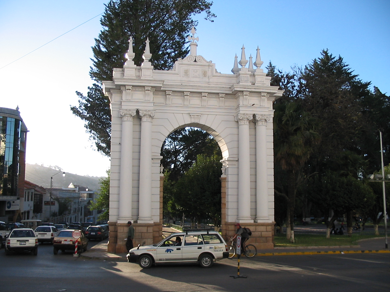 Triomfboog met op de achtergrond Parque Bolivar (Sucre, Bolivië)